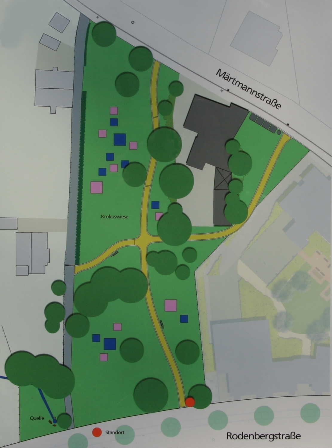 Dortmund Aplerbeck, Lageplan Ewaldipark